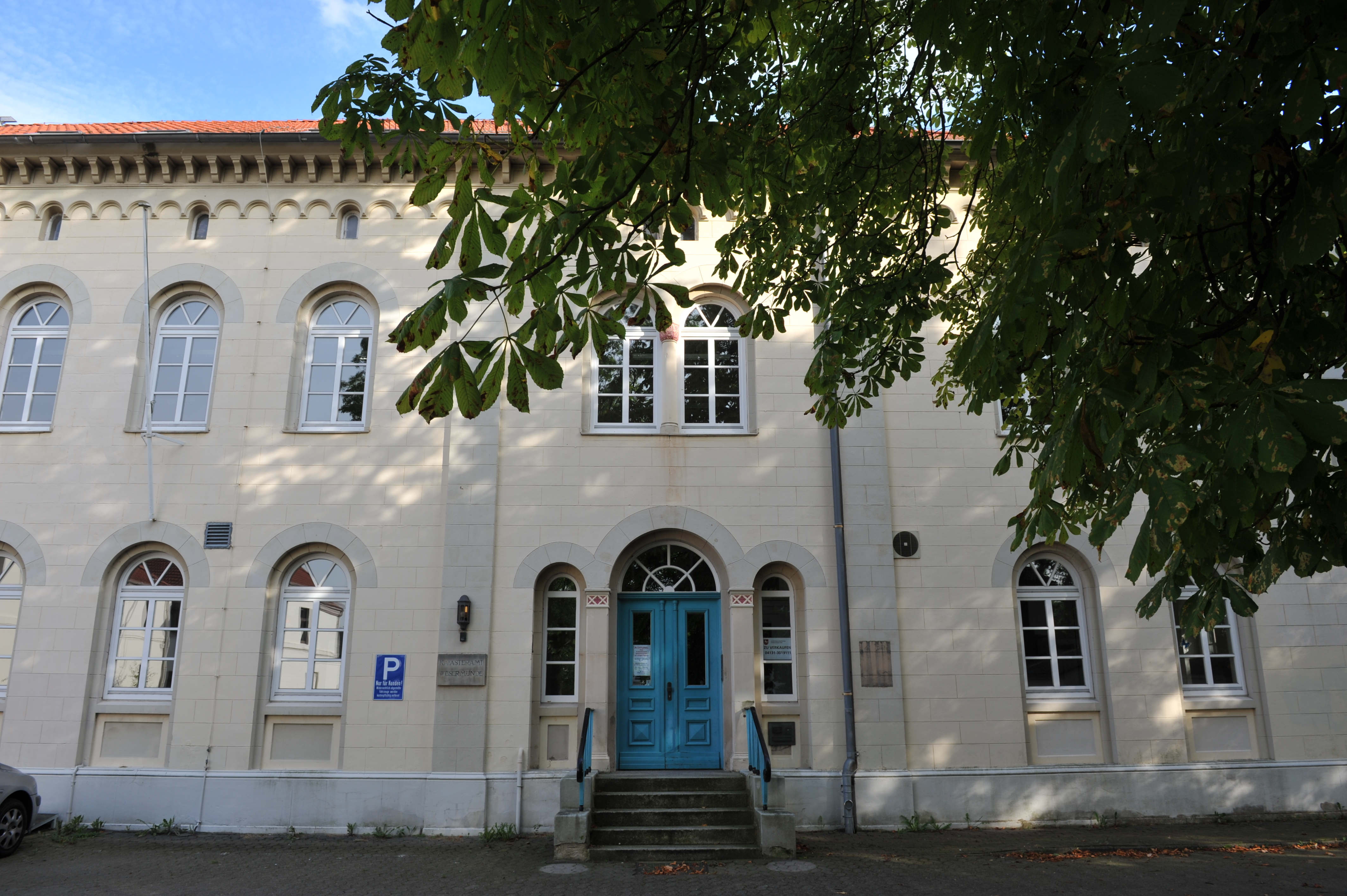 Historical building in Bremerhaven, northern Germany Hannoversches Amtshaus, Lange Straße 121, 1851 Das abgebildete Objekt ist ein geschütztes Kulturdenkmal in der Freien Hansestadt Bremen, mit der Nr. 1577 beim Landesamt für Denkmalpflege registriert.